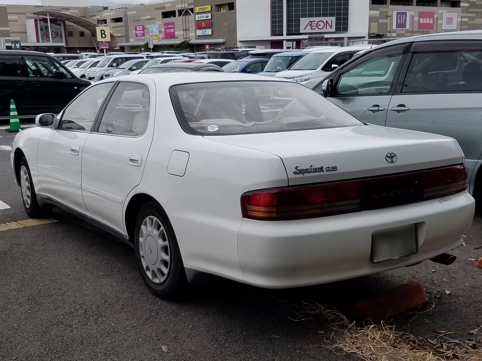 クレスタ 2.5スーパールーセント（後期型）